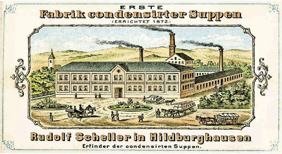 Die Fabrik von Rudolf Scheller zur Herstellung von Trockensuppen in Hildburghausen auf einer Werbekarte